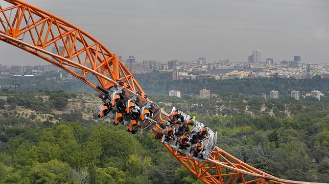 Játék